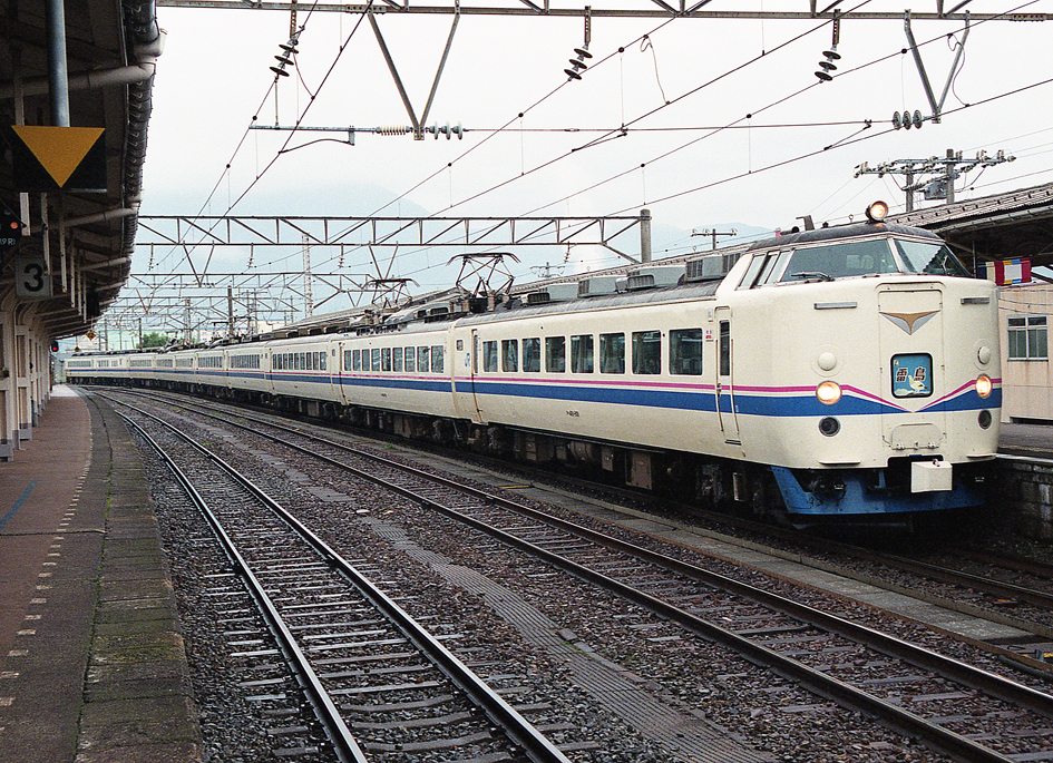 JR西日本 485系特急形電車 特急「雷鳥」 クハ481-801 スーパー雷鳥色